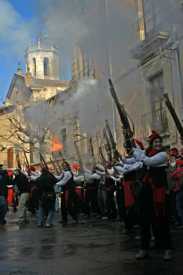 Galejadors a la festa del Pi (Centelles-Osona-Catalunya)